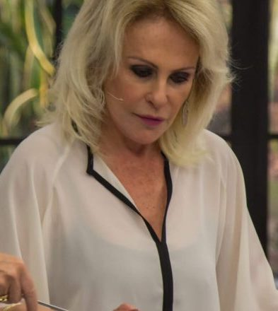 Ana Maria recebe a embaixadora norte-americana Liliana Ayalde e ensina receita de Cookie.